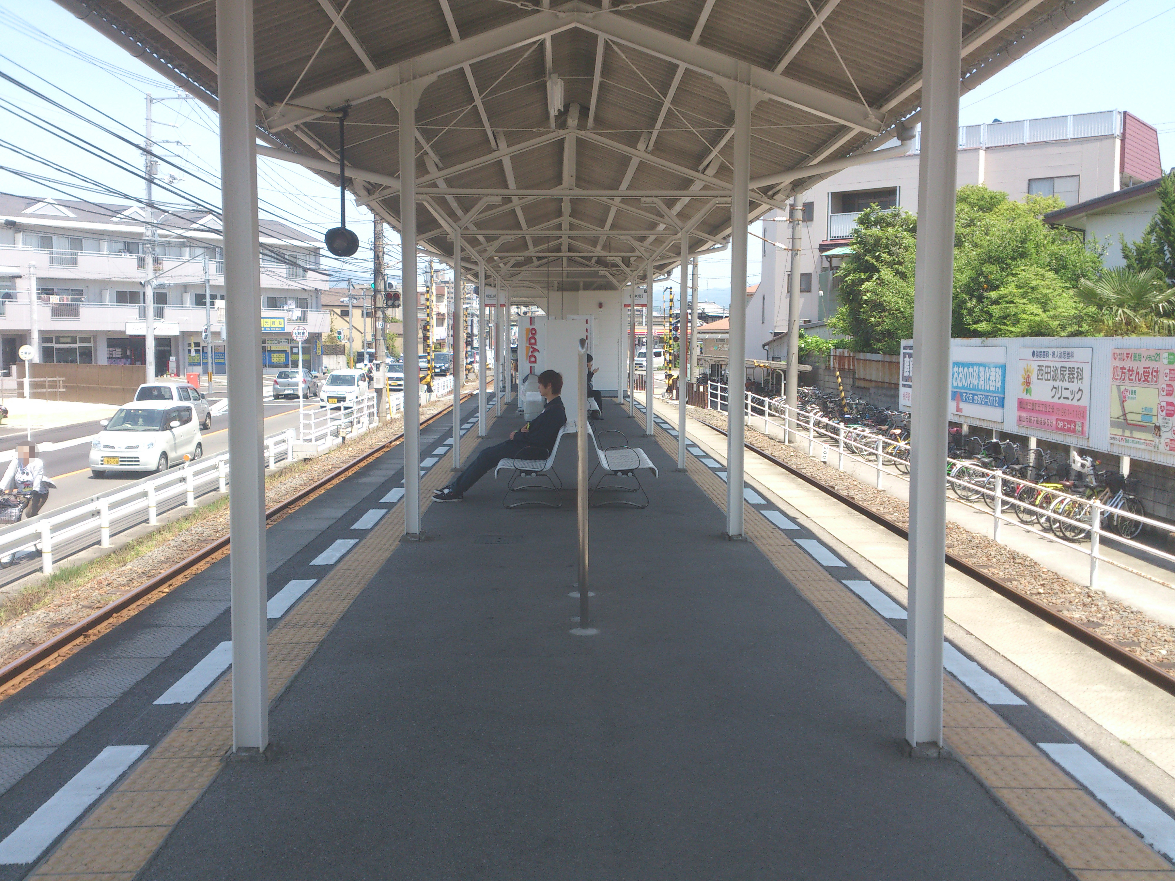 土居田駅のホーム